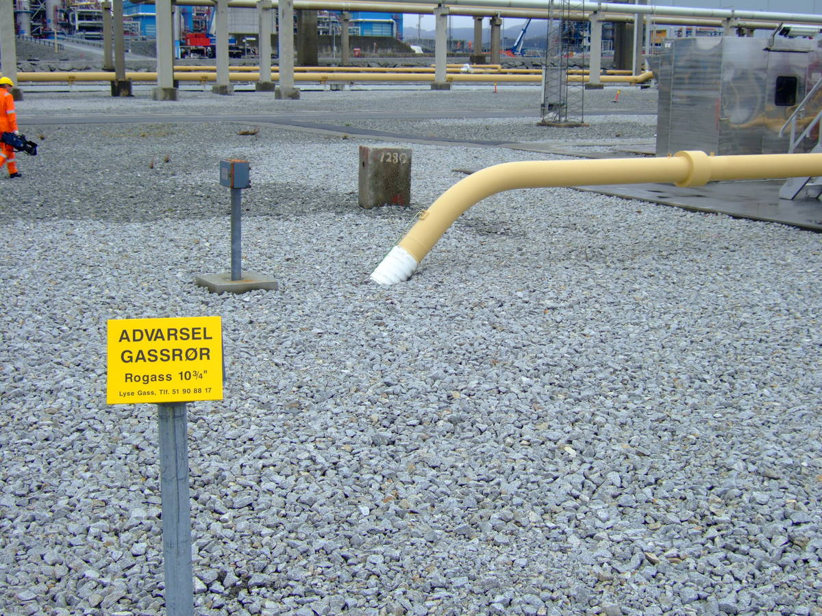 Rogass fra Kårstø